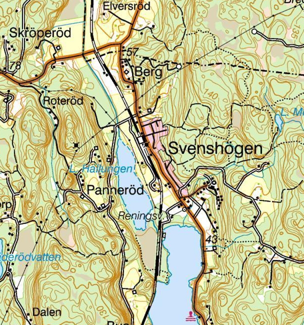 Karta över tätorten Svenshögen (utsnitt ur Terrängkartan).